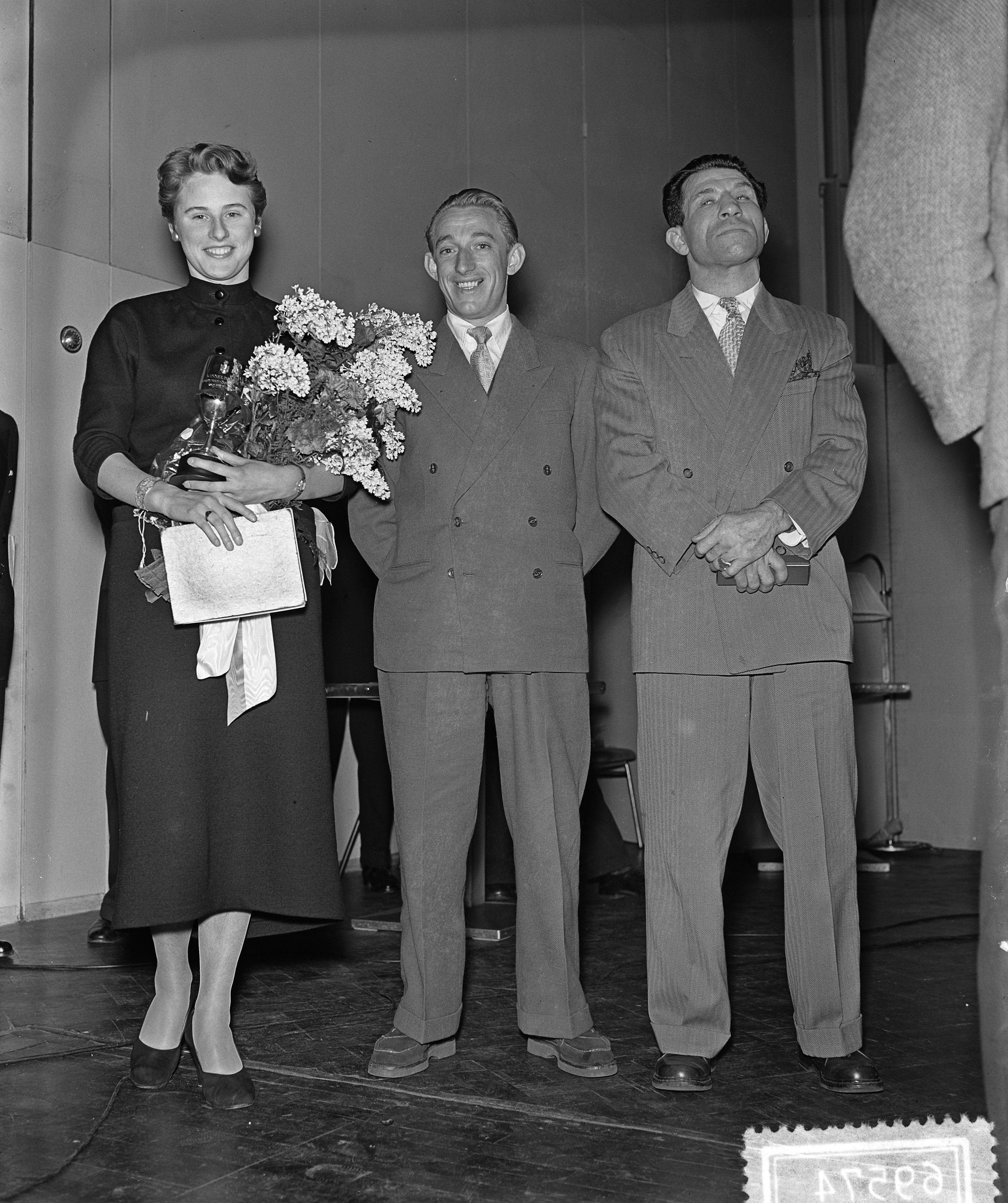 Collectie / Archief : Fotocollectie Anefo Reportage / Serie : [ onbekend ] Beschrijving : AVRO verkiezing beste sporter 1954, Geertje Wielema (1) en Wout Wagtmans (2) Datum : 25 januari 1955 Trefwoorden : Verkiezingen Persoonsnaam : Geertje Wielema, Wagtmans, Wout Fotograaf : Pot, Harry / Anefo Auteursrechthebbende : Nationaal Archief Materiaalsoort : Glasnegatief Nummer archiefinventaris : bekijk toegang 2.24.01.09 Bestanddeelnummer : 906-9574